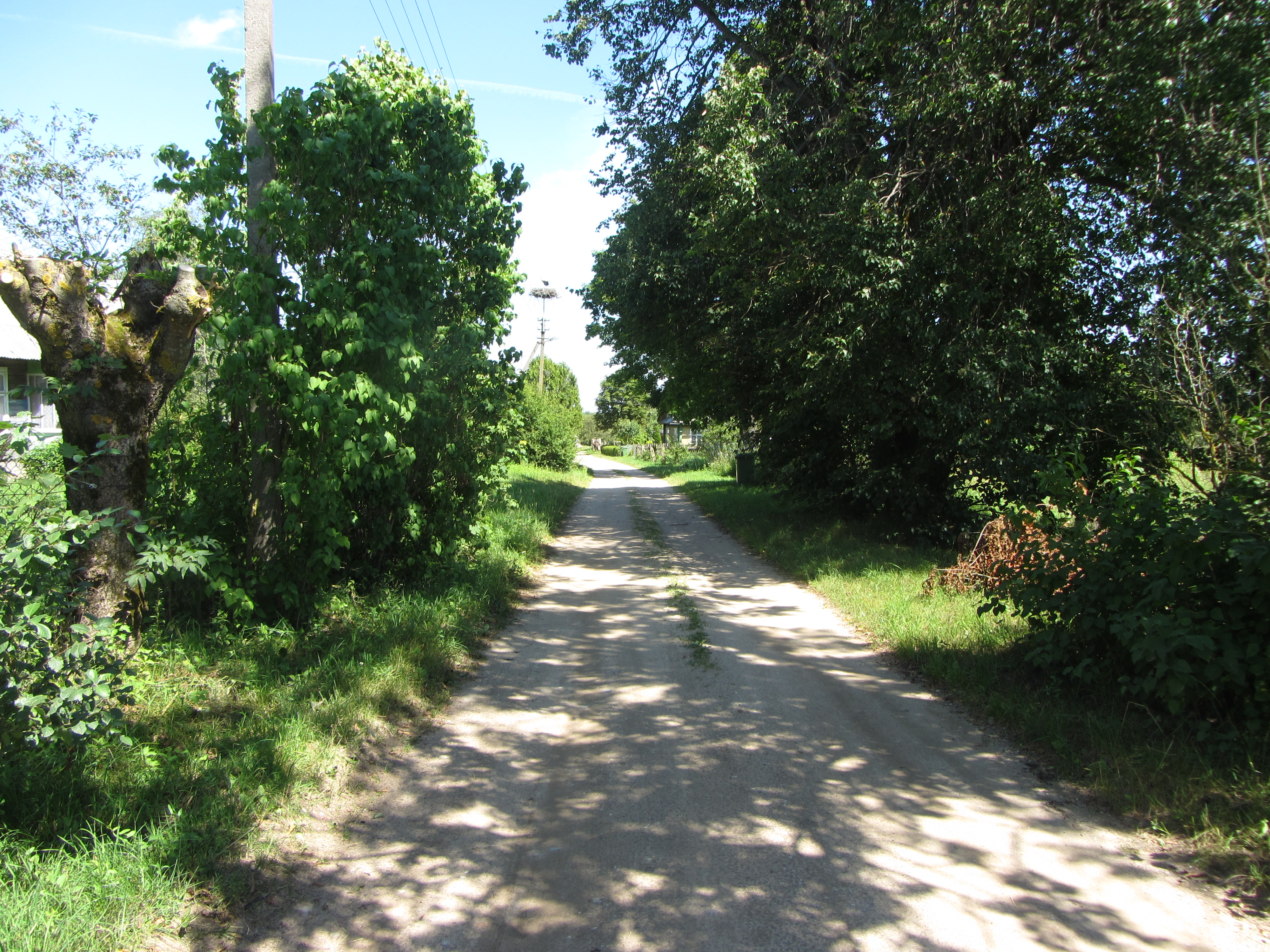 Senosios Naniškės 65441, Lithuania